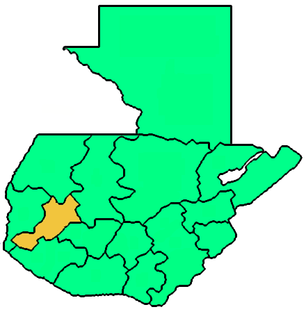 Mappa dell'arcidiocesi cattolica di Los Altos, in Guatemala. Lavoro personale eseguito a partire da questa immagine di Commons. Fonte per i confini delle diocesi